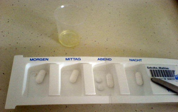 Dispenser mit vier Fächern für Tabletten (Morgen, Mittag, Abend, Nacht), in Verwendung bei einem Münchner Krankenhaus